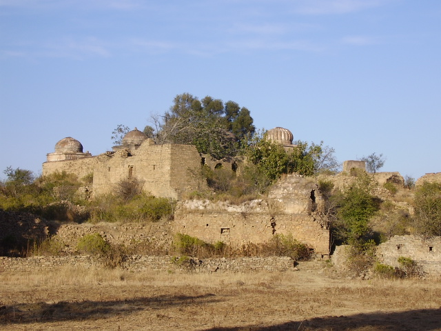 Ancient Hindu temple ruins at Tilla Jogian Salt Range Pakistan